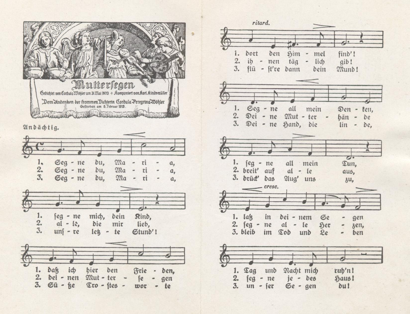 Cordula Wöhler, Andenkenbildchen der Erzdiözese München, 1916